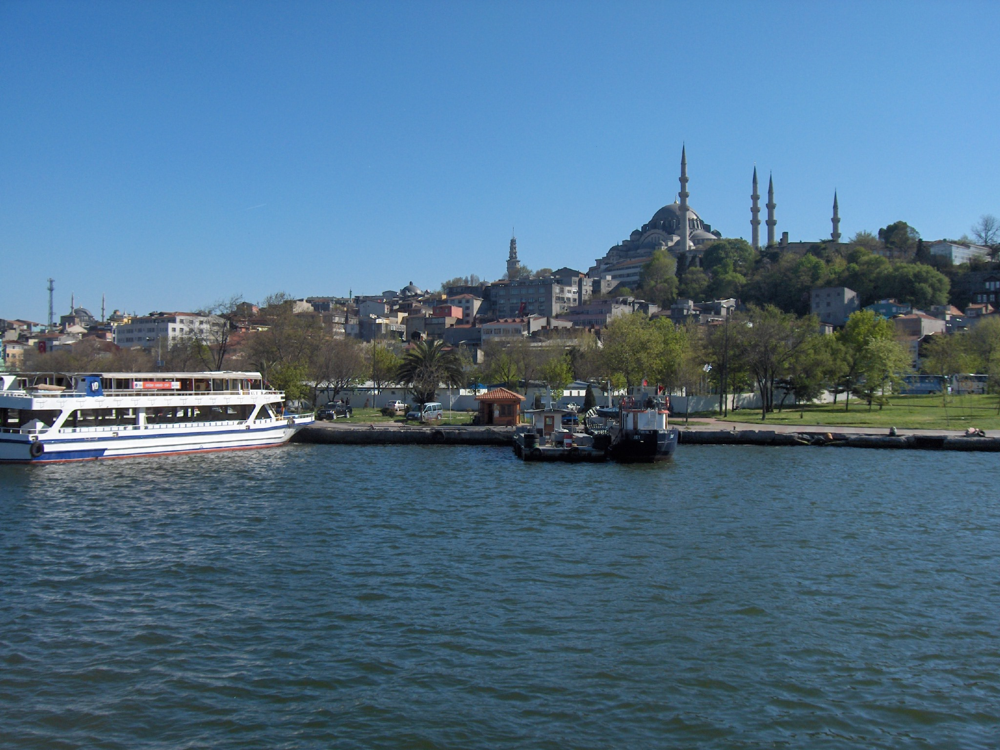 Süleymaniye Mosque; Istanbul, Turkey